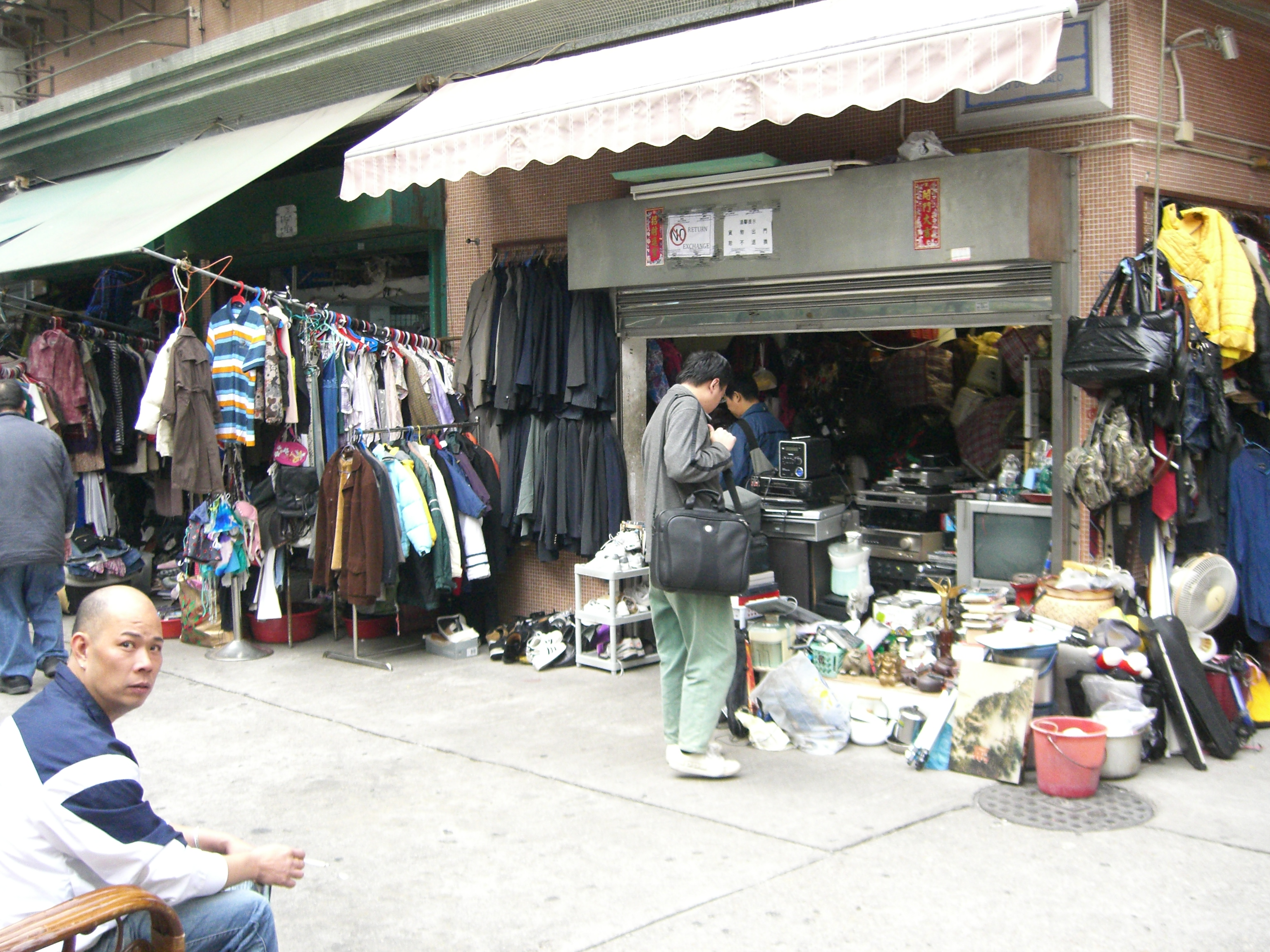 馬里